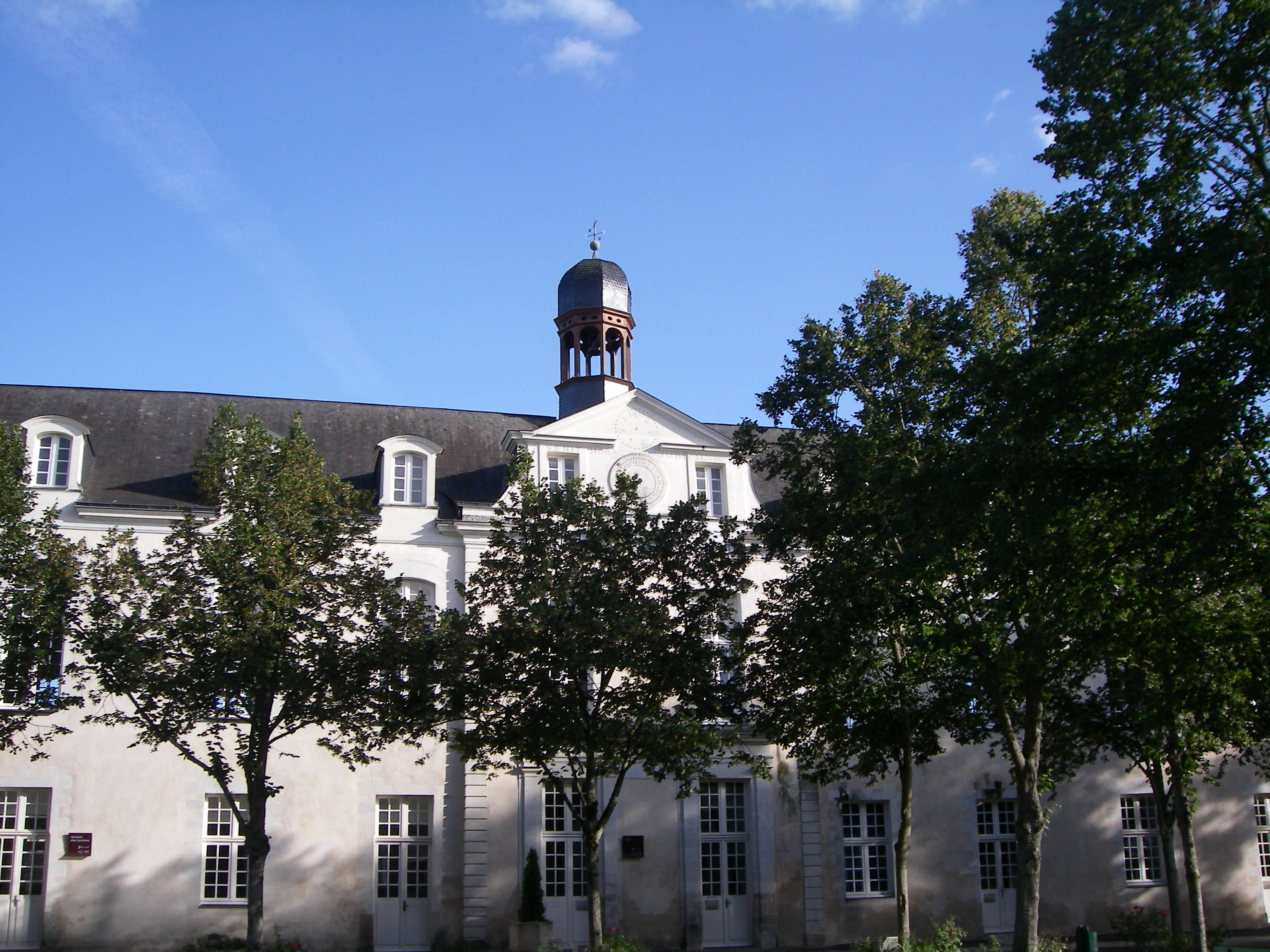 lycée Victor-Hugo Bâtiment de l'horloge, en partie classé (1735)